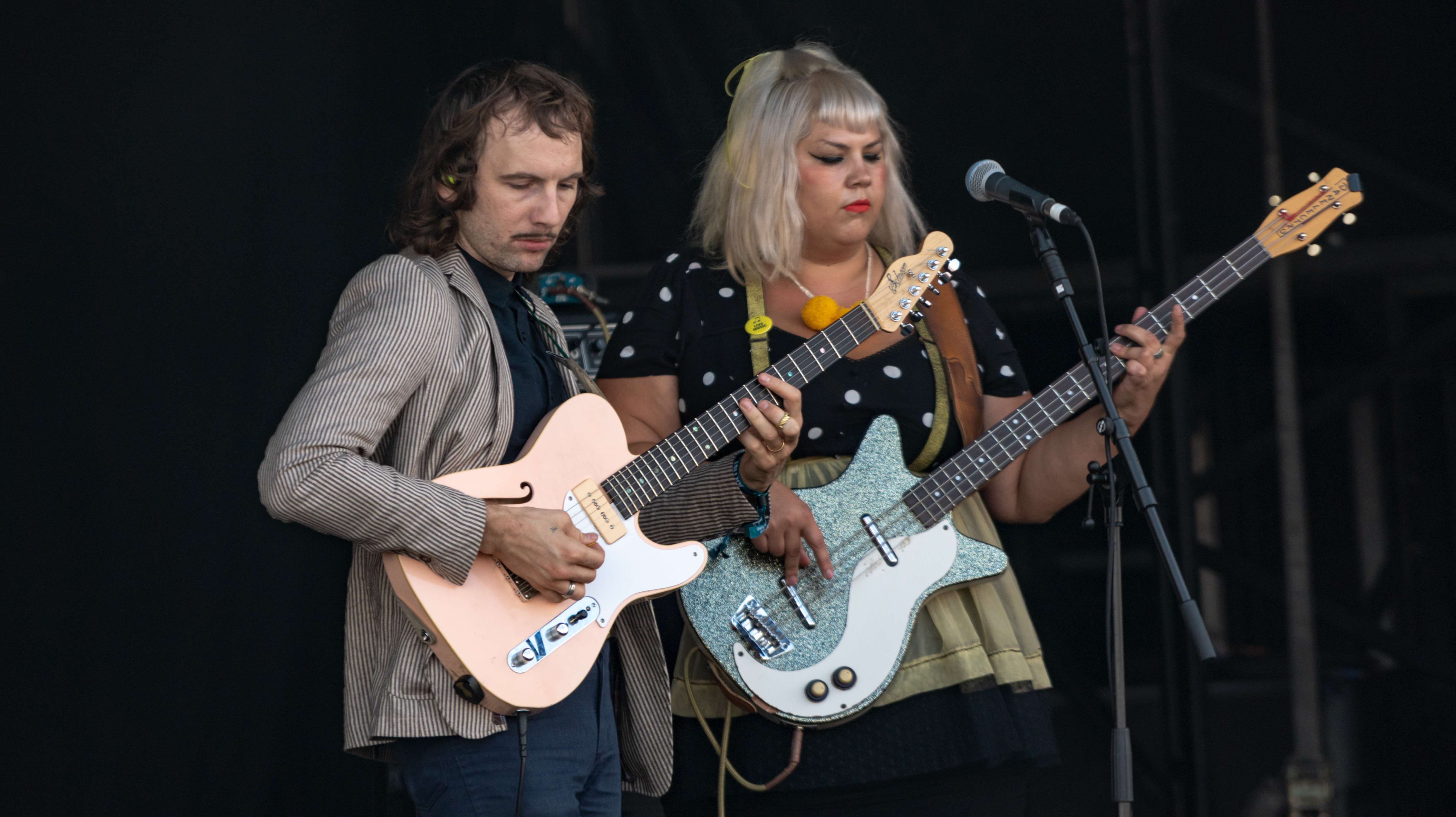 EOTR010918-6